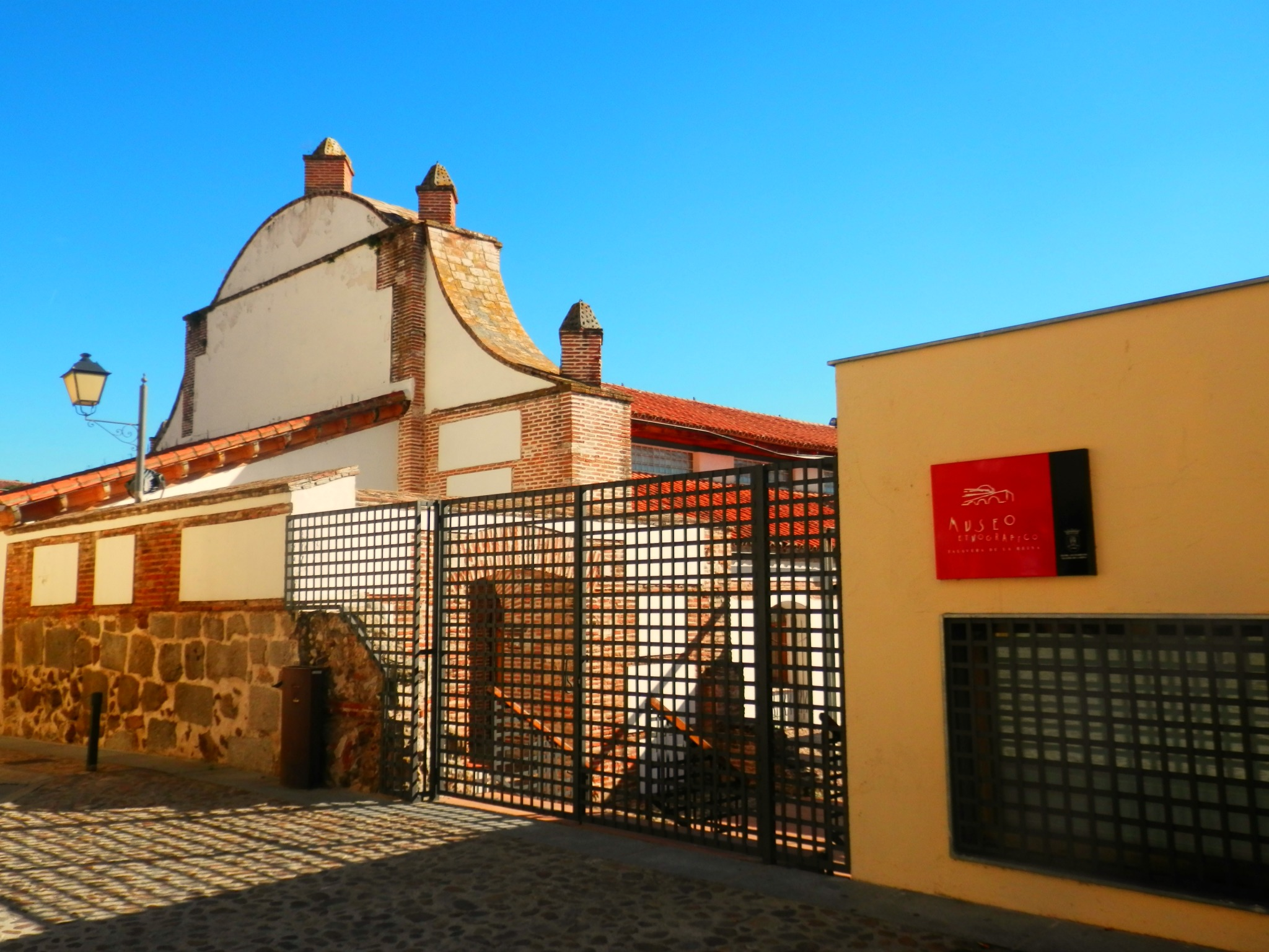 Museo Etnográfico de Talavera